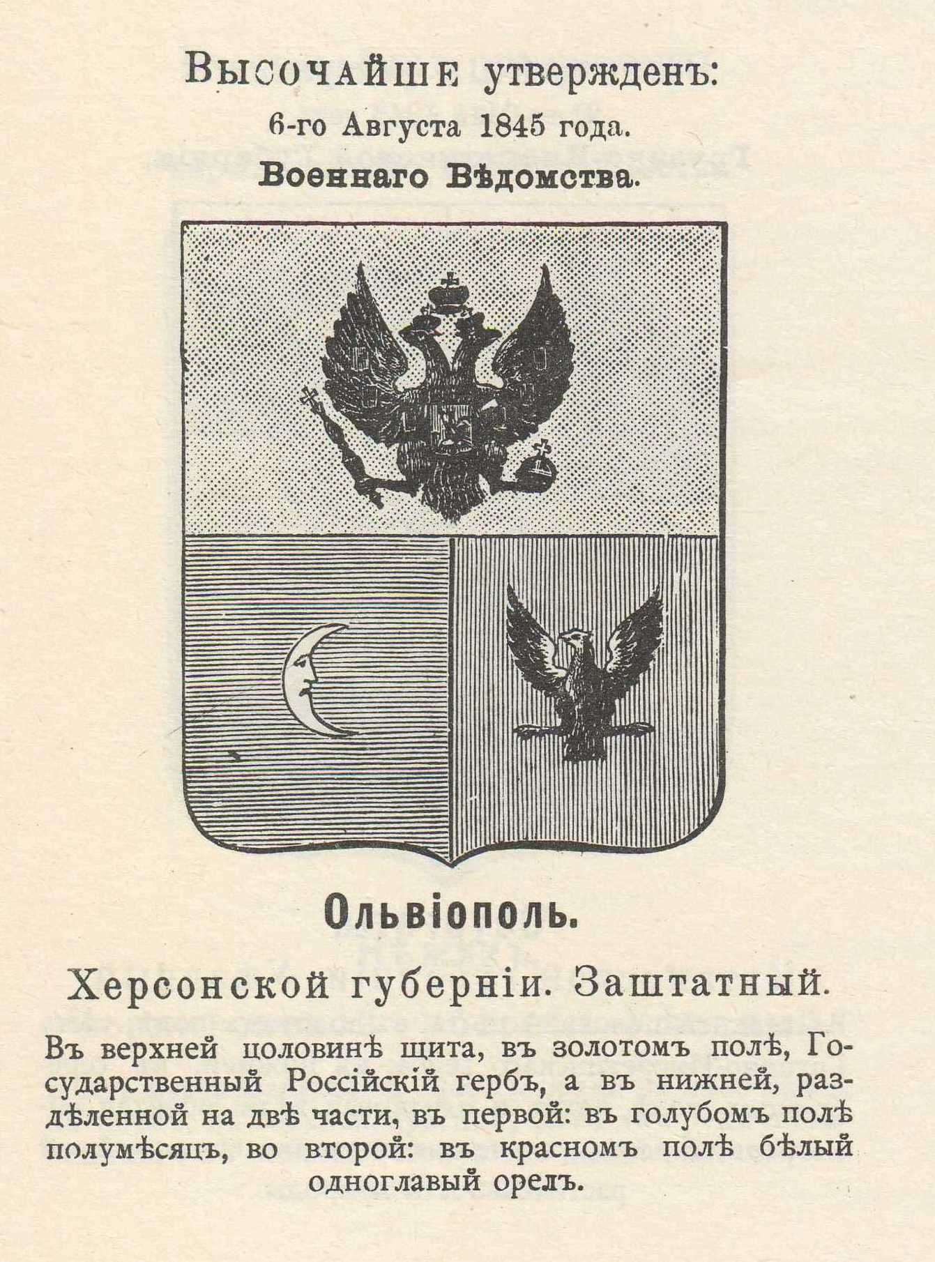 Герб Ольвиополя с официальным описанием в Гербовнике Винклера